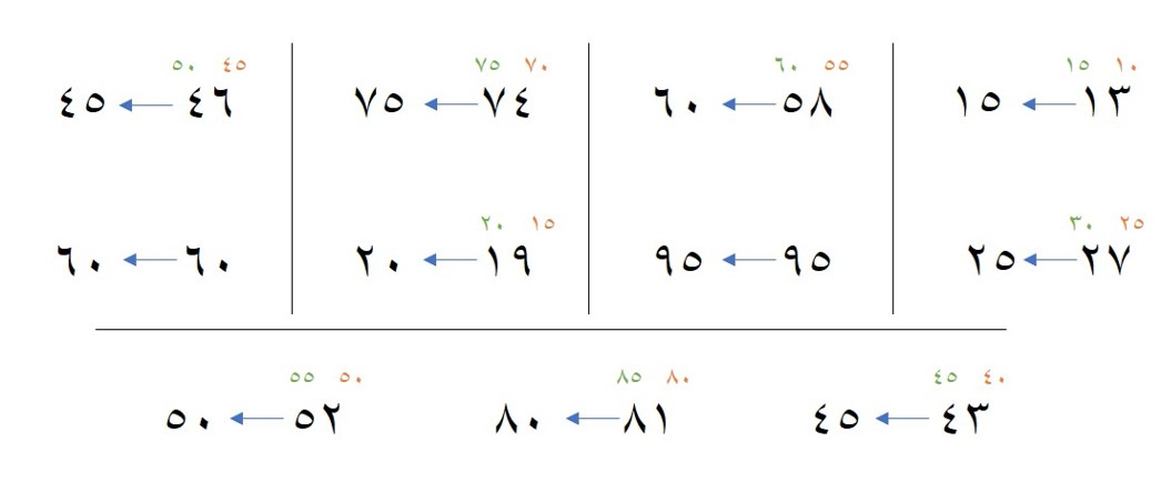 أمثلة على تقريب الأعداد لأعداد متناغمة